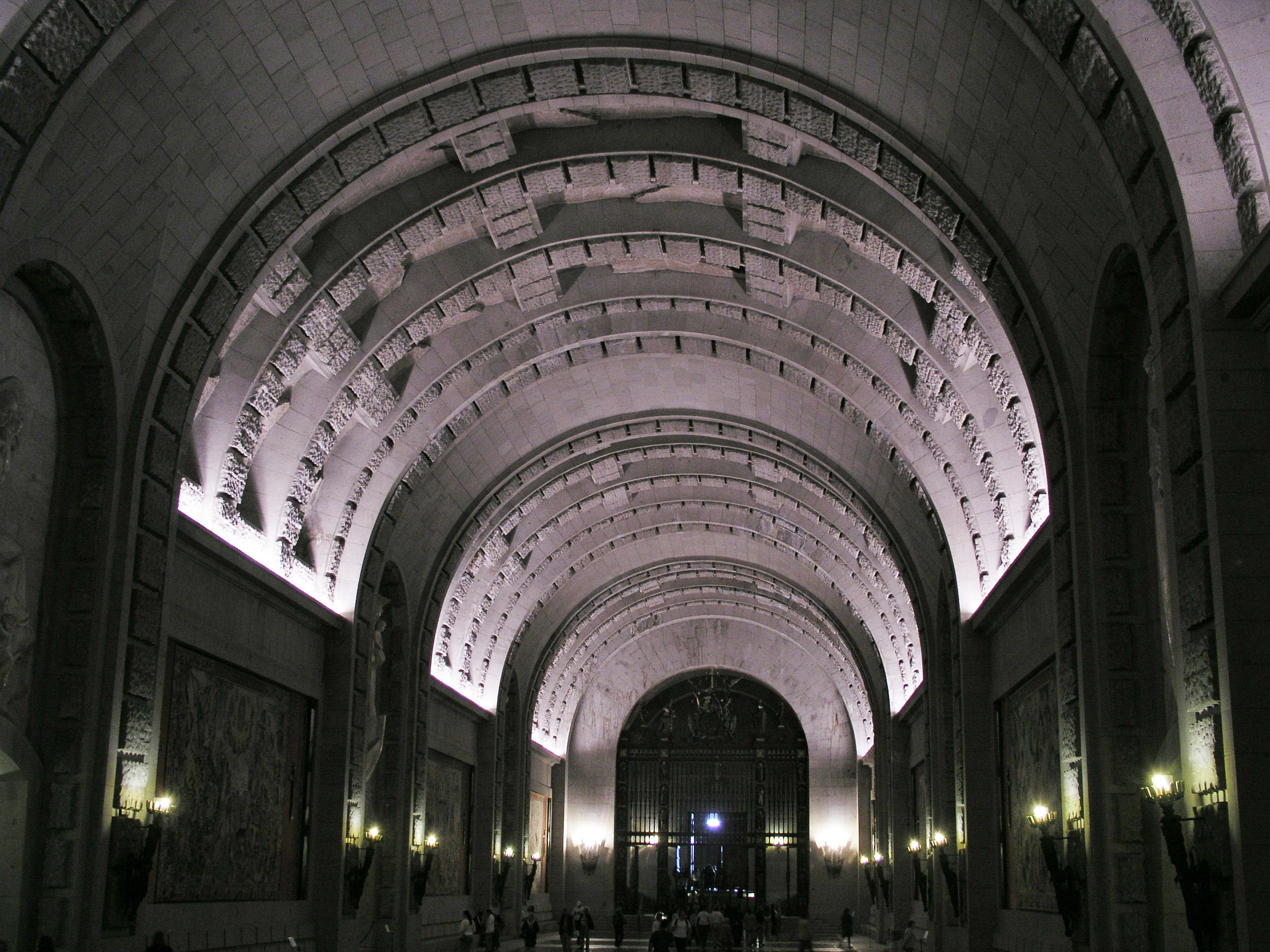 Valle de Los Caidos, Madrid, Spain. Crypt, Central Nave.